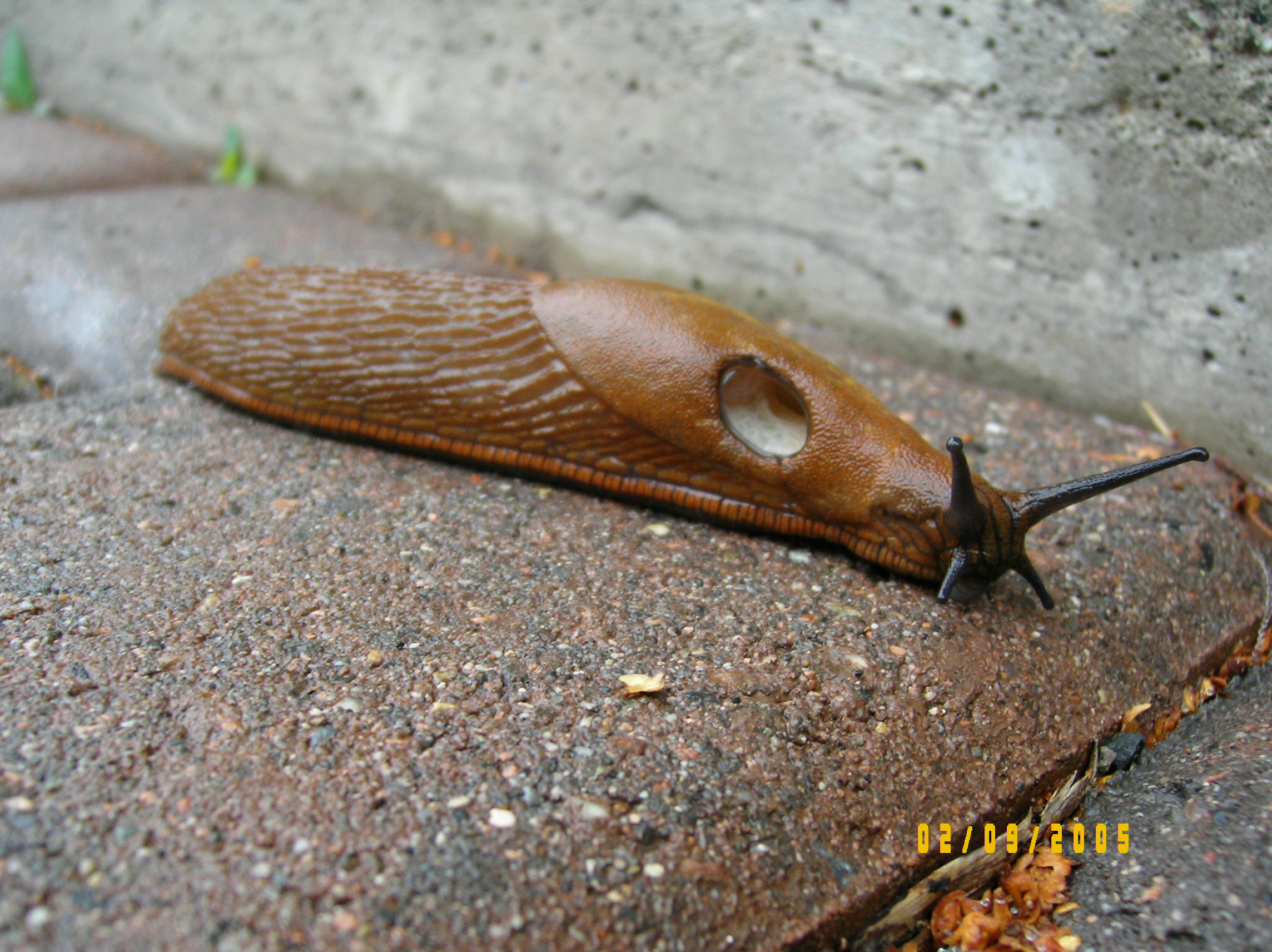 Zdjęcie wykonane w norwegii